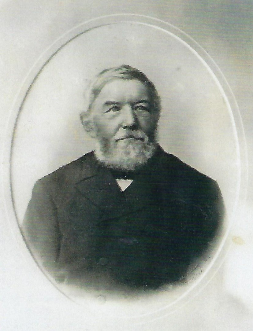 Porträtfotografie des Orgelbauers Friedrich Hermann Lütkemüller